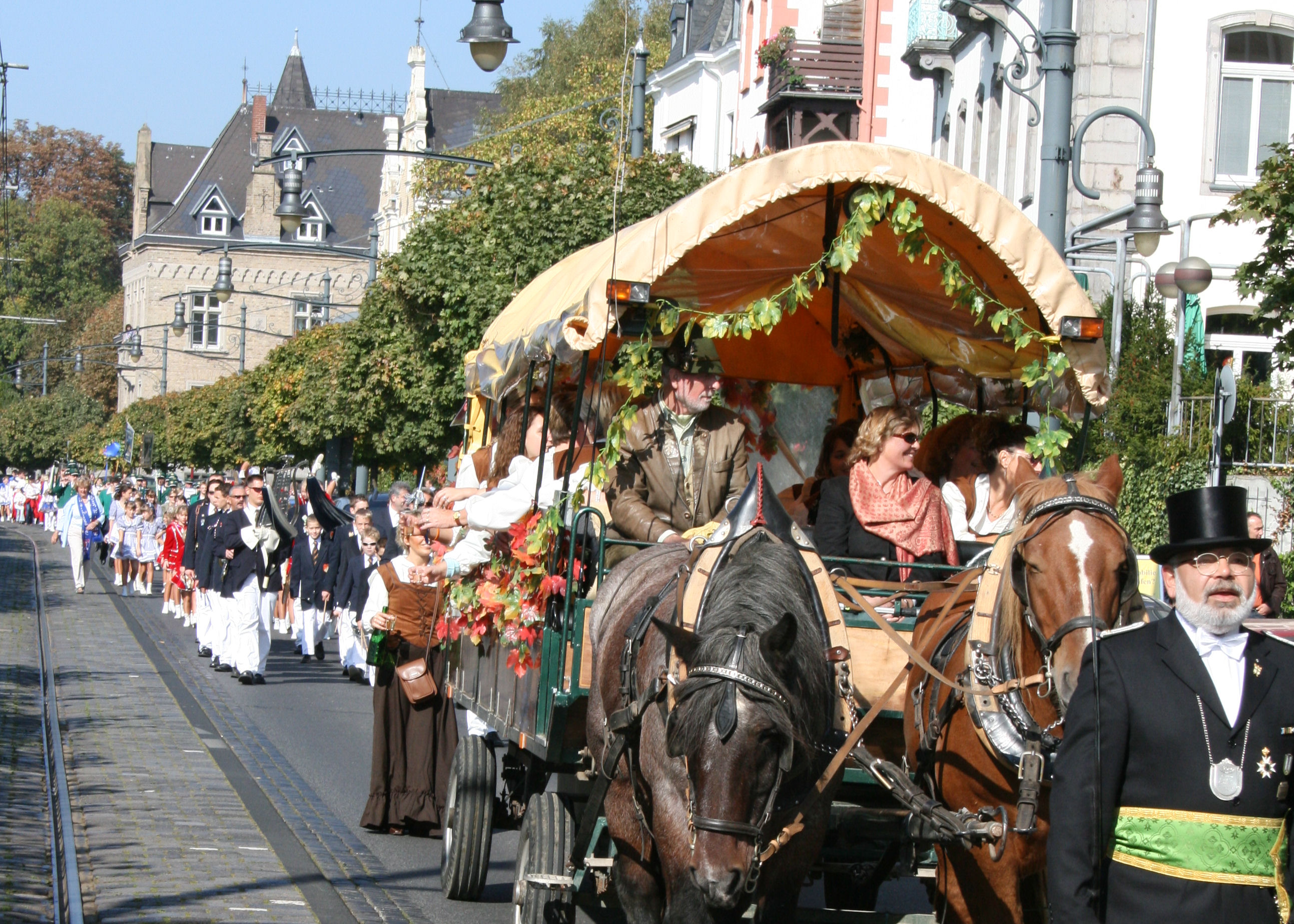 Erntedankzug Königswinter auf der Rheinallee